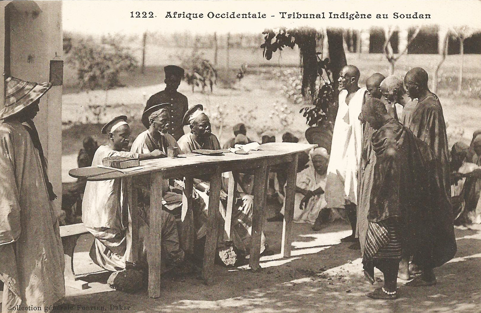 François-Edmond Fortier, Tribunal indigène au Soudan. Afrique Occidentale - Soudan.